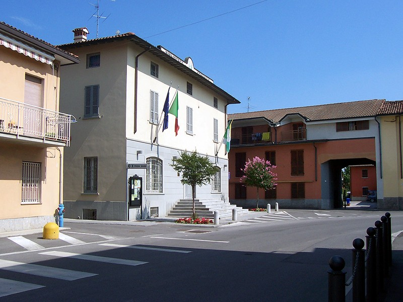 Brignano Gera d'Adda - Biblioteca Comunale